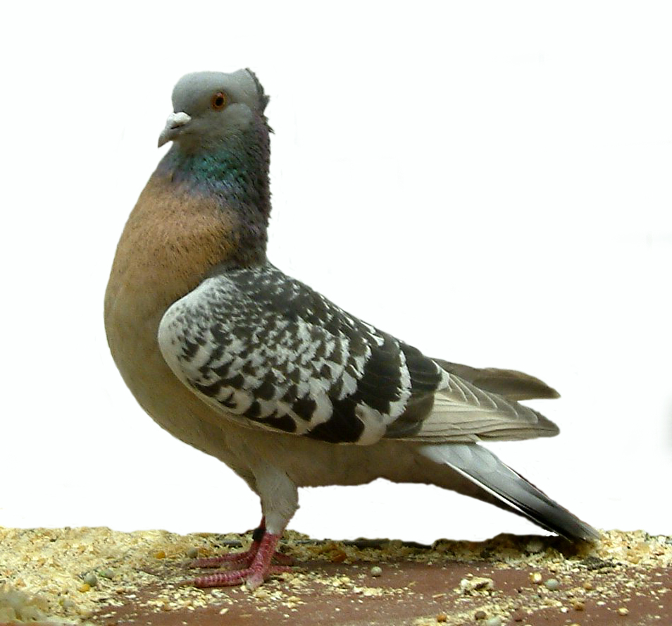 Berne Lark (Chequer)